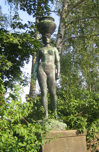 Danaide. Skulptur von Johannes Schilling in Dresden (ursprünglich als Brunnenfigur geplant)